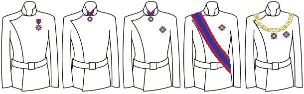 Modo di indossare le decorazioni dell'Ordine Piano (Stato Pontificio - Città del Vaticano)